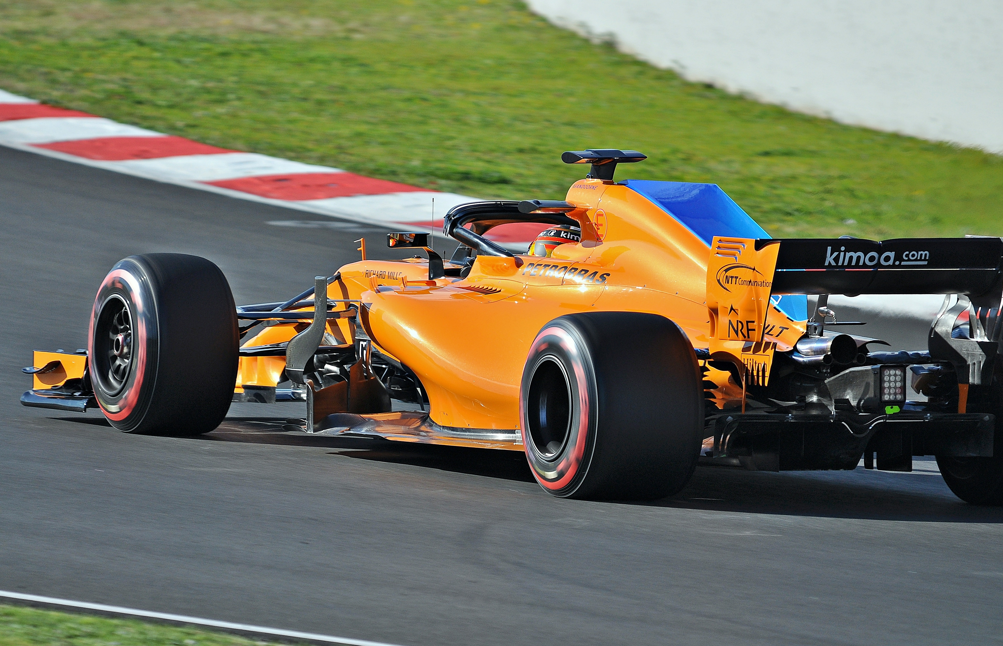 McLaren MCL33